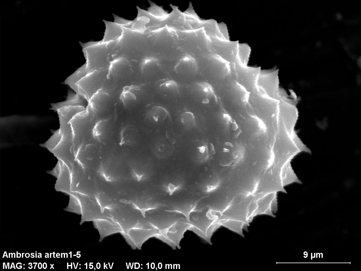 Ambrosia artem - Pollen (Rasterelektronenmikroskop)